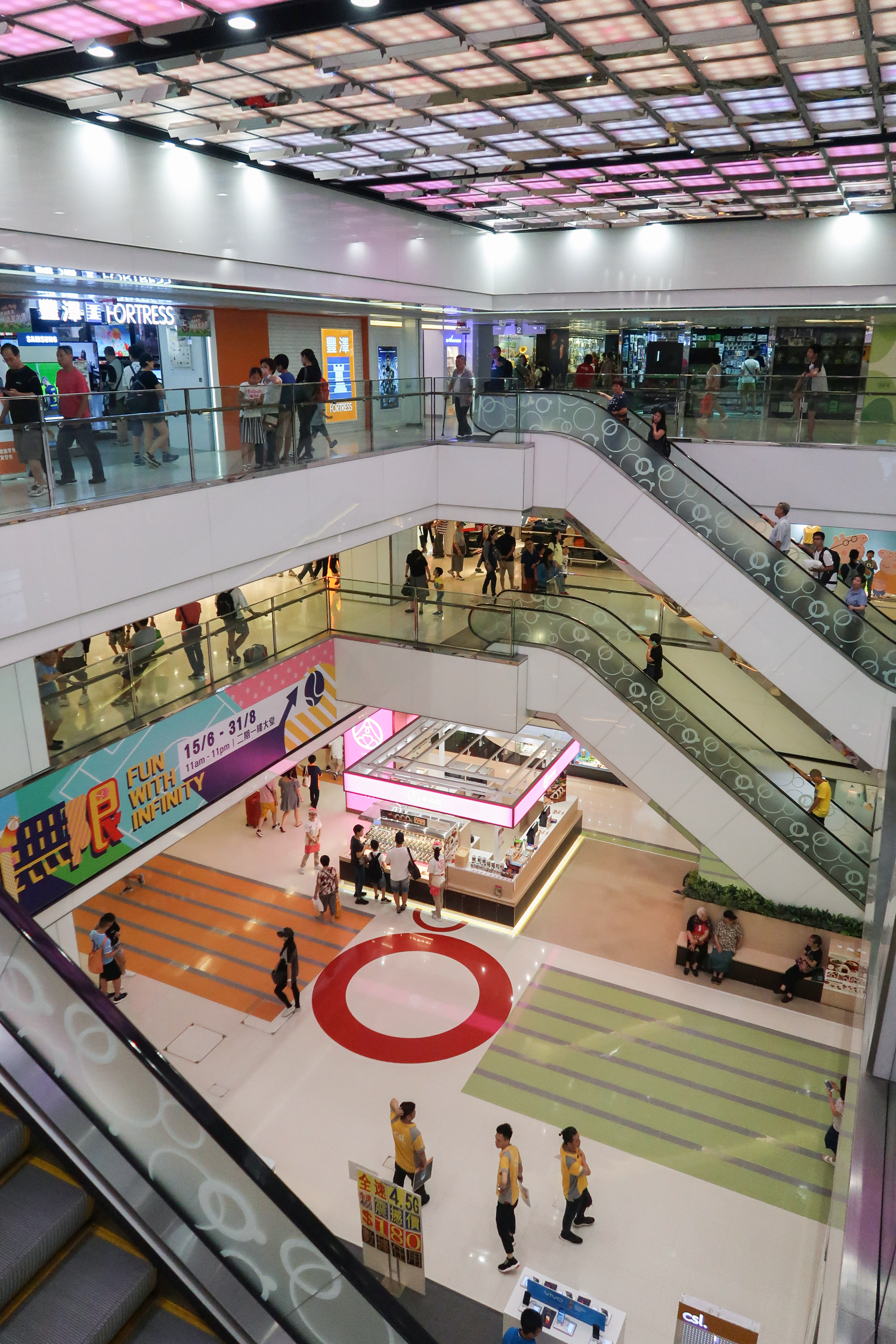 Amoy Plaza Main Atrium